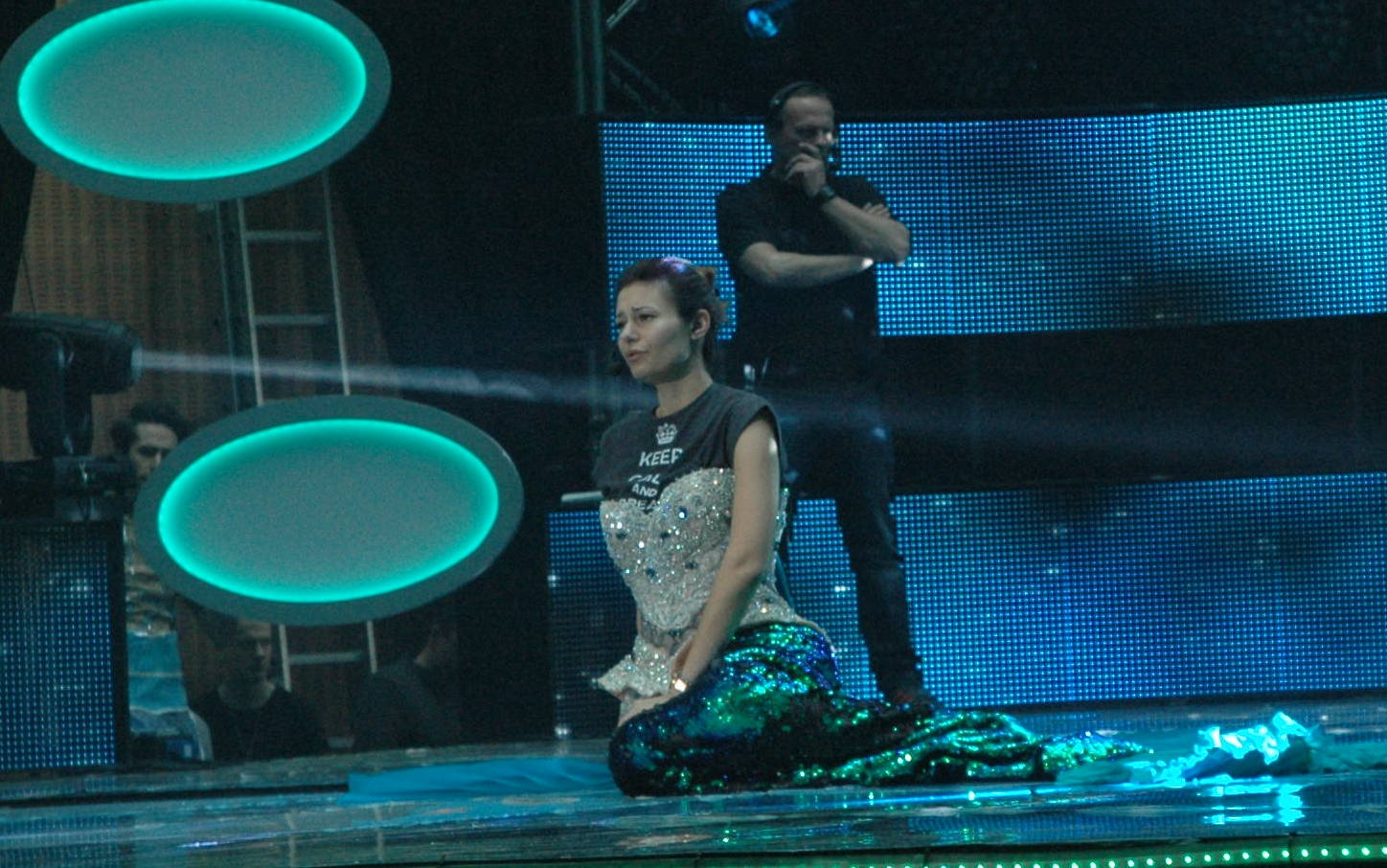 Ola Gintrowska podczas prób do występu w Krajowych Eliminacjach do Konkursu Piosenki Eurowizji 2016.